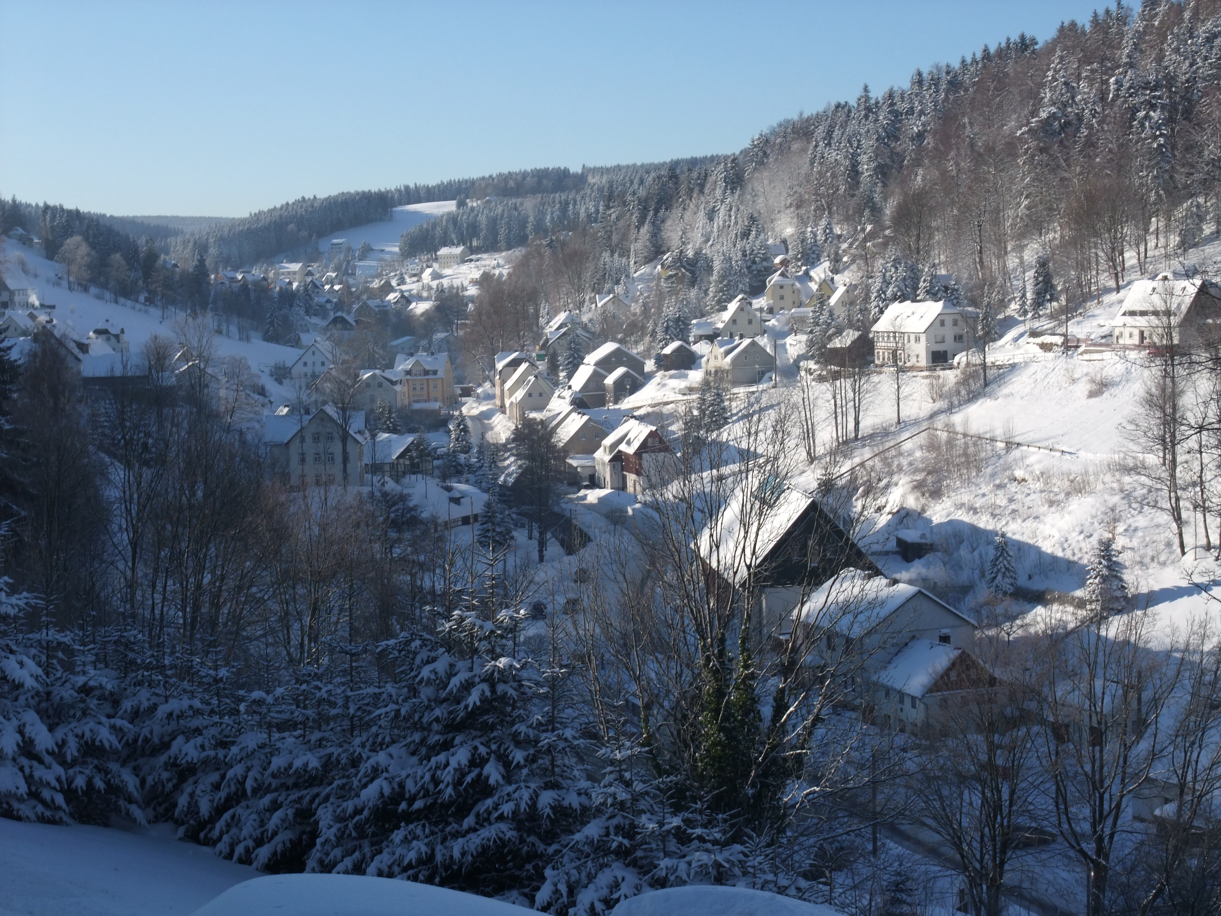 Die Ortsmitte und der Obere Grund von Pobershau, Blick von der Zugstraße Richtung Süden.